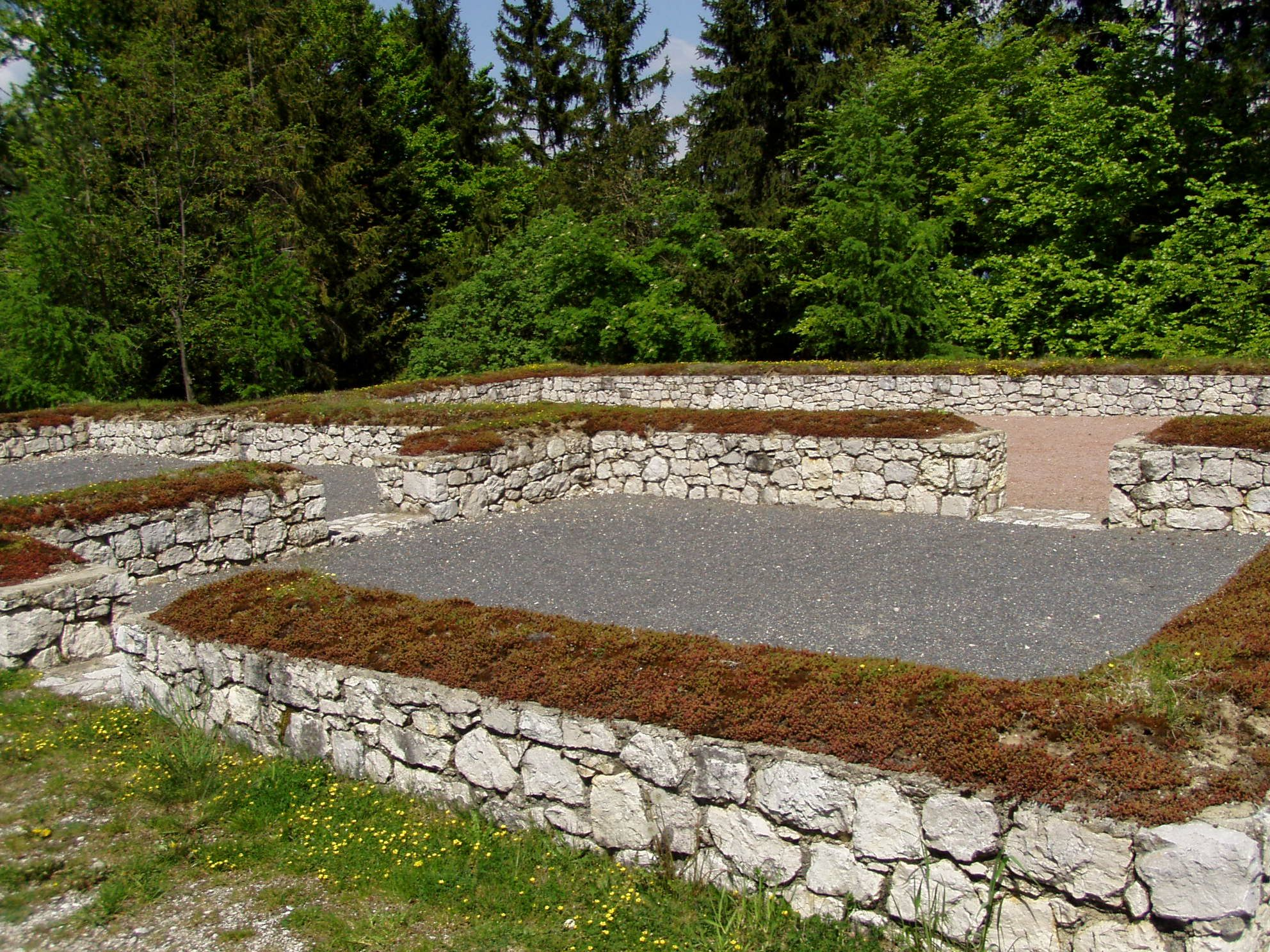 Hemmaberg, Carinthia. Pilgerhaus (Gebäude H)